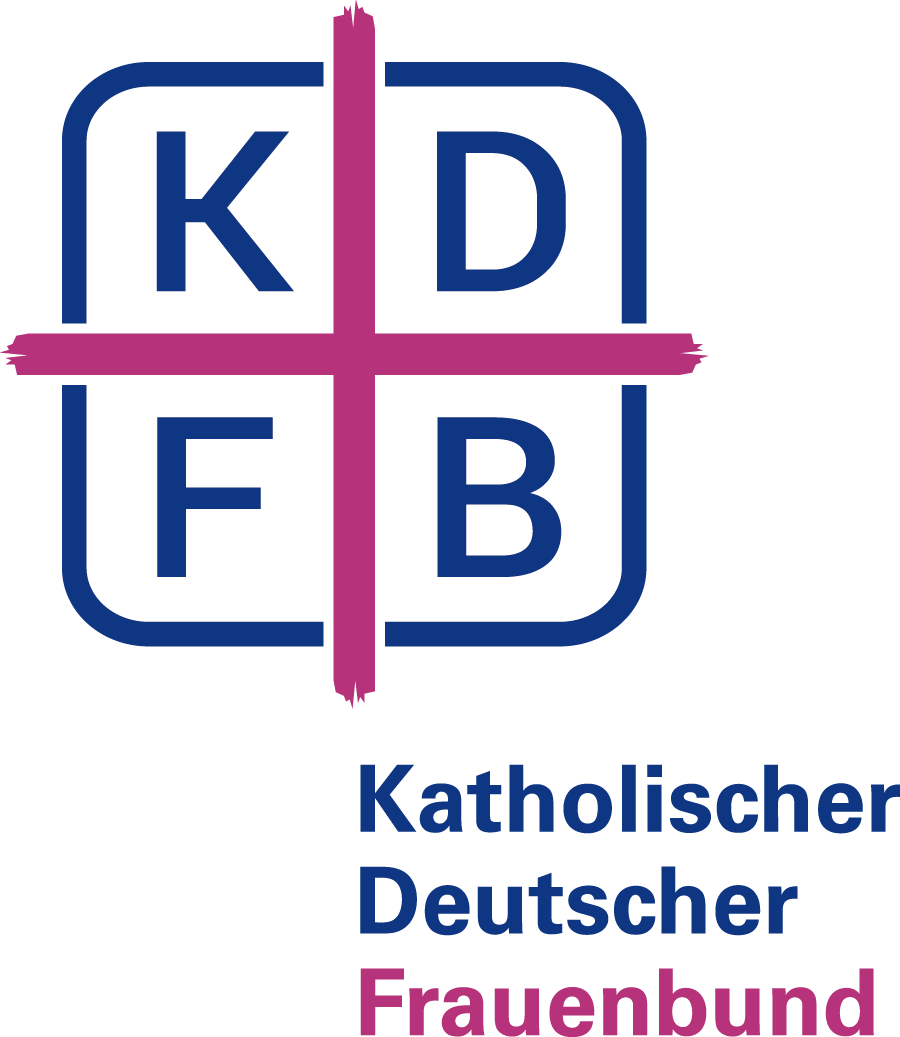 Logo Katholischer Deutscher Frauenbund e. V.